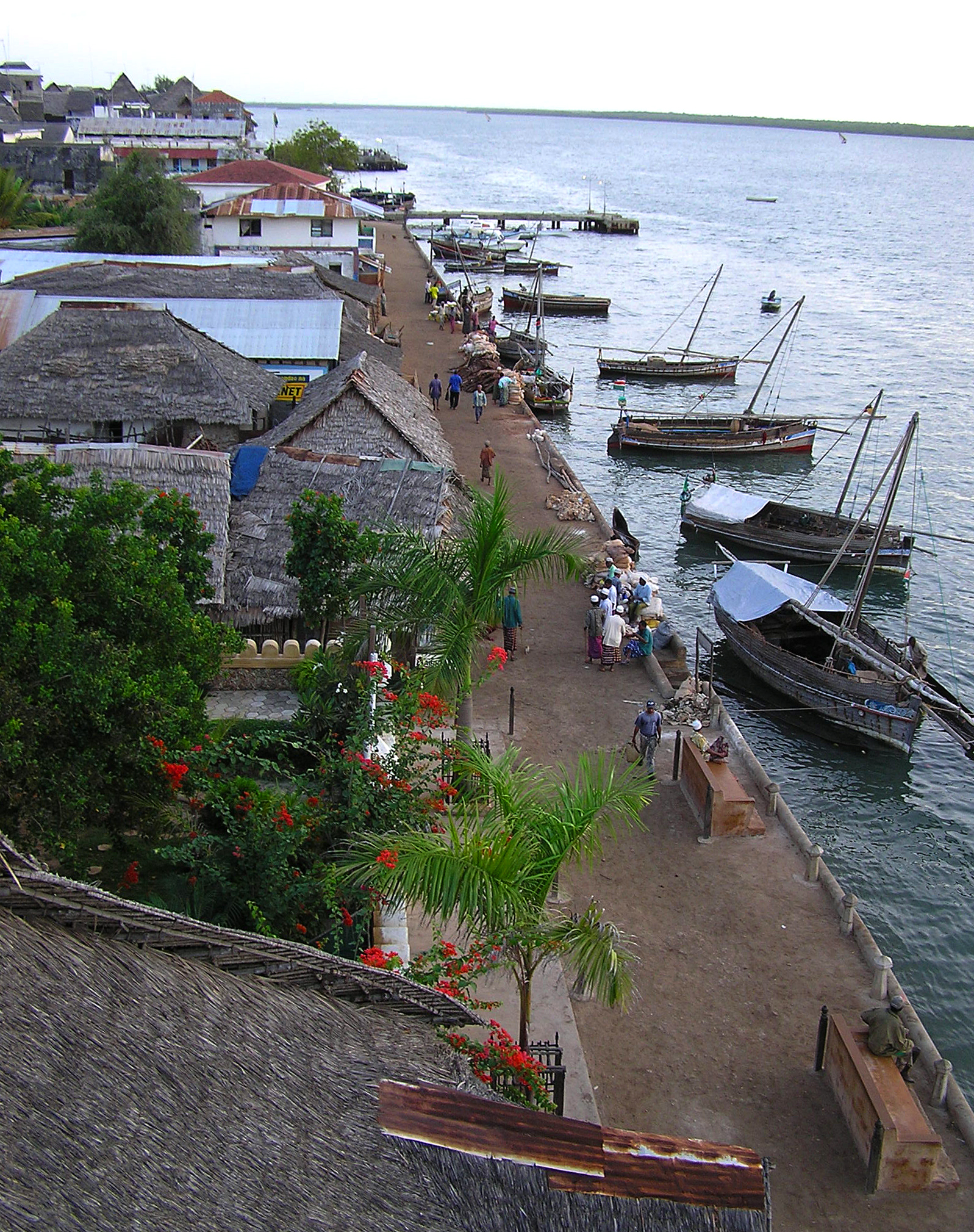 Lamu harbour